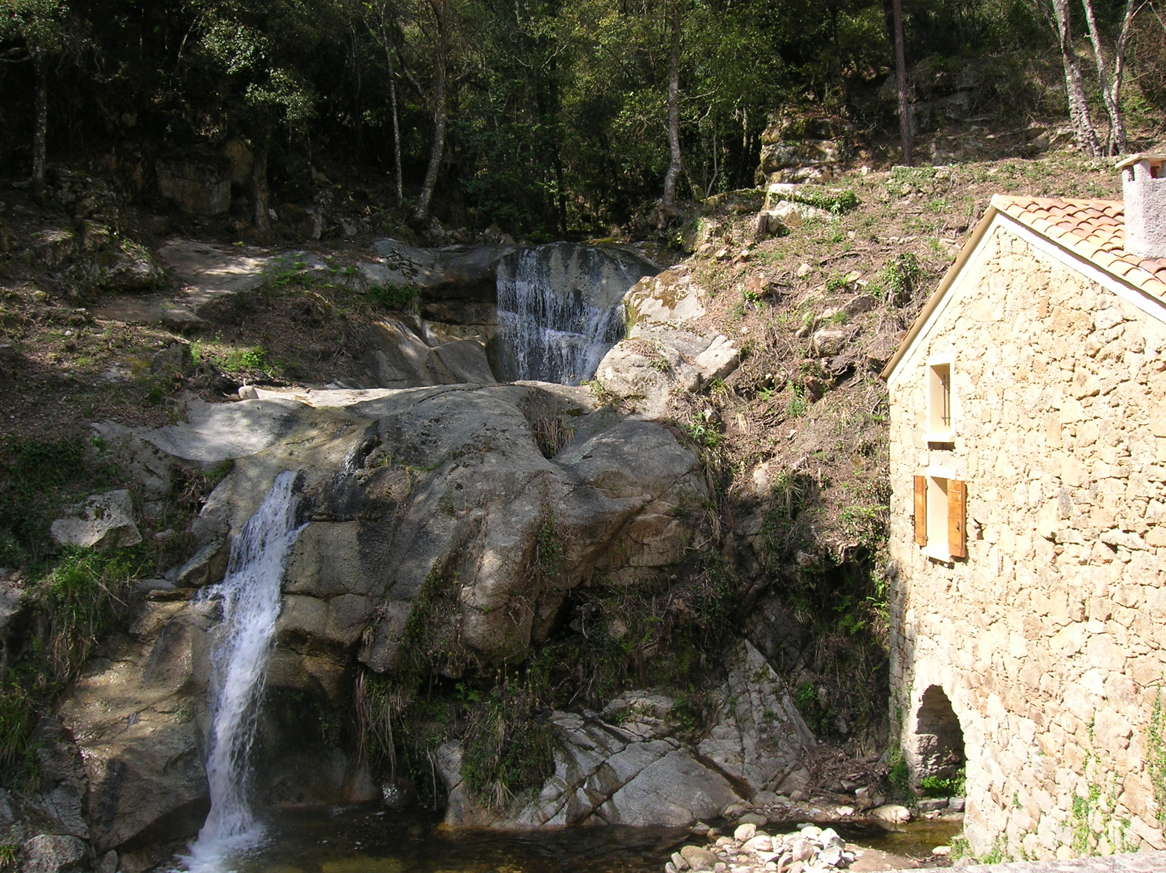 Le moulin de Rezza appartenant à la famille Nicoli a été restauré en 2005-2006